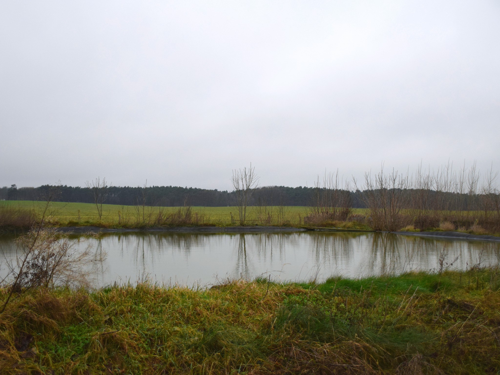 Teich an der Berliner Straße, Booßen, Frankfurt (Oder), Deutschland